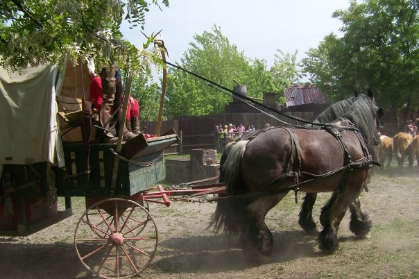 Cowboyland, parco divertimenti di Voghera, Lombardia, Italia.